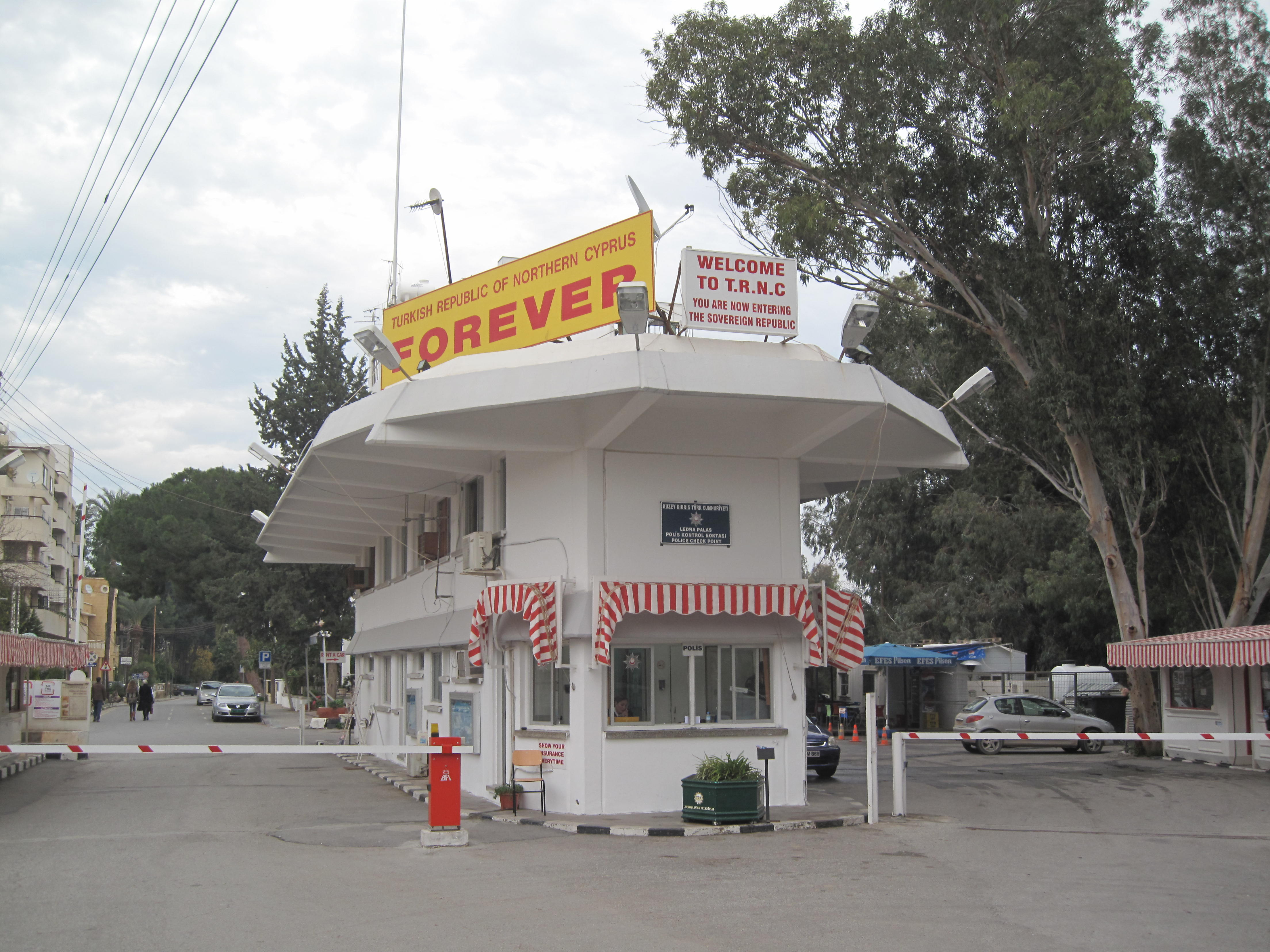 Border crossing at the Green Line in Nicosia, Northern Cyprus section. overgang in Nicosia